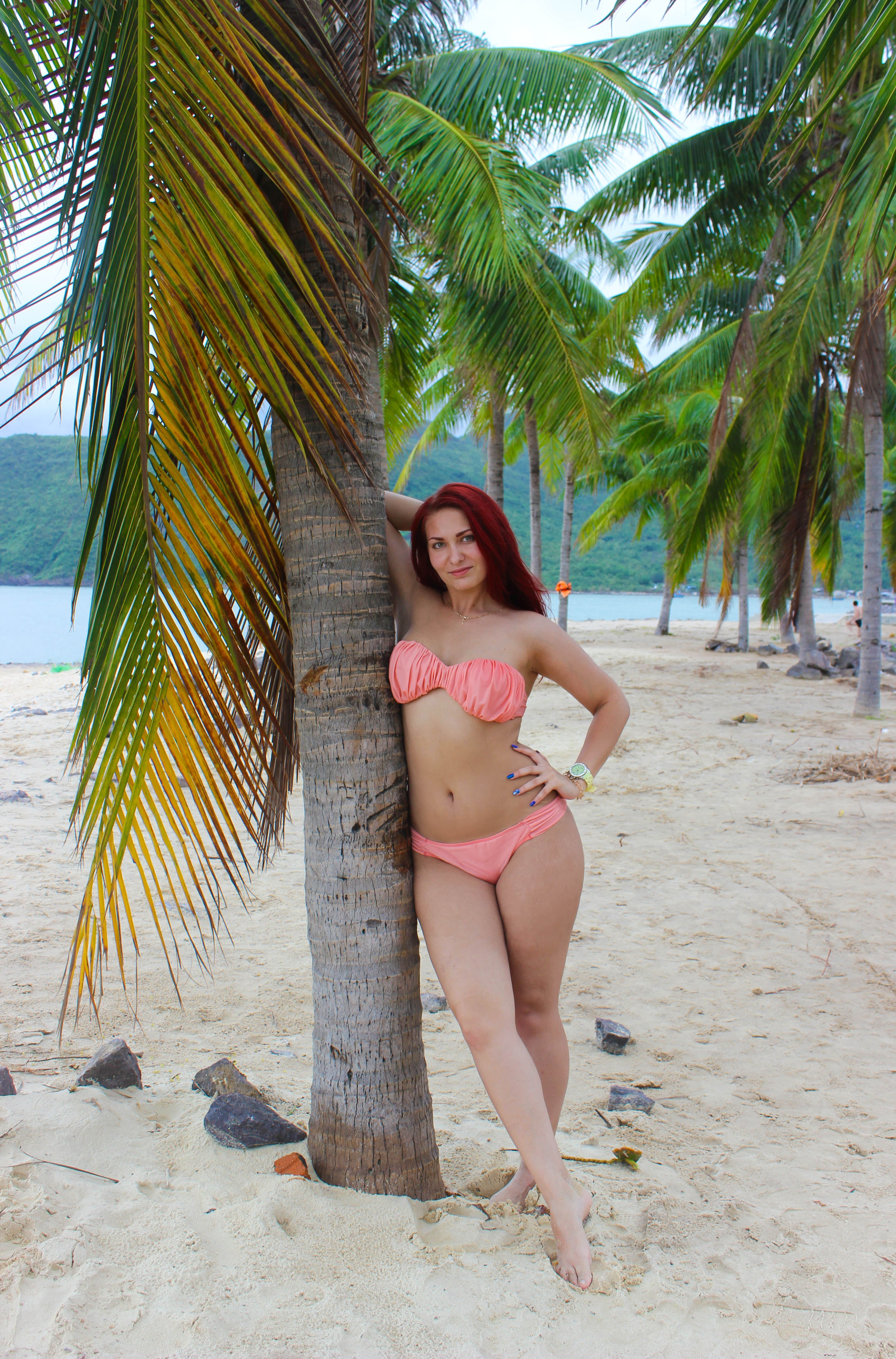 Учитель начальных классов Юлия Липатова во Вьетнаме, в декабре 2017 года.